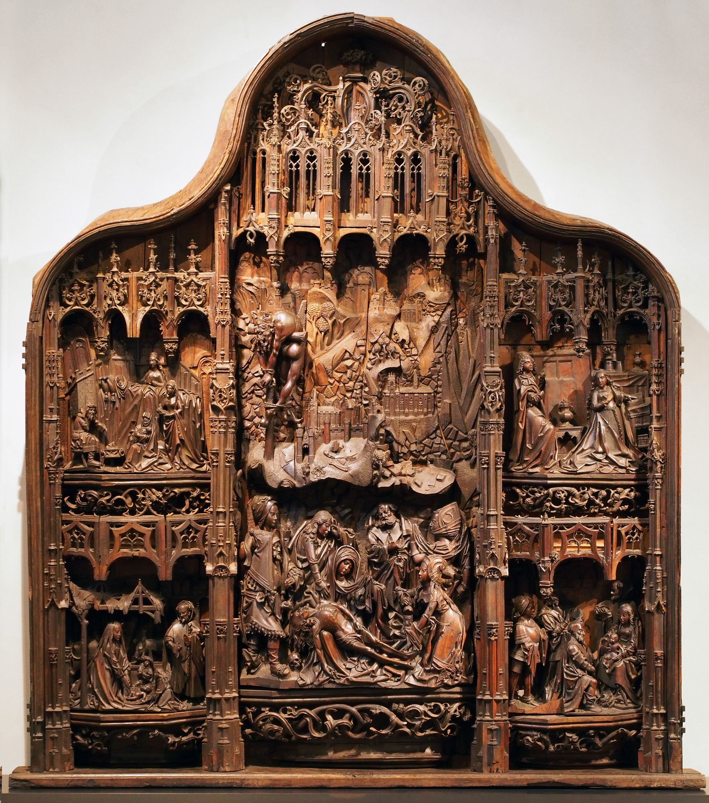 Retablo de la Vida de la Virgen, c. 1515. Obra anónima. Museo Nacional de Escultura, Valladolid.